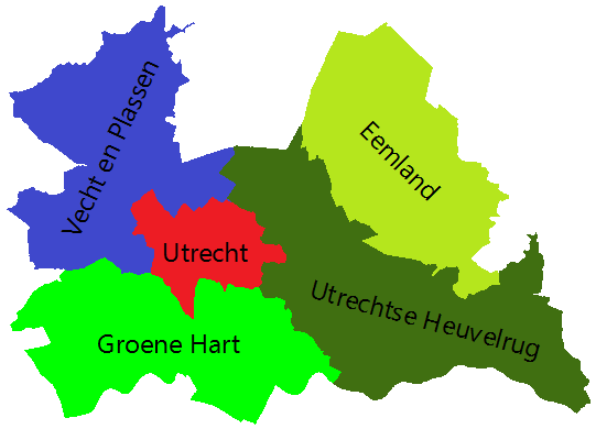 Regio's van de provincie Utrecht.